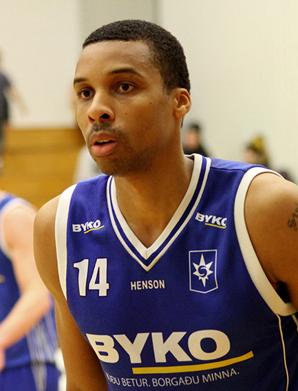 Jarrid Frye (14) with Stjarnan in á 2014-2015 Úrvalsdeild karla game against Grindavík.